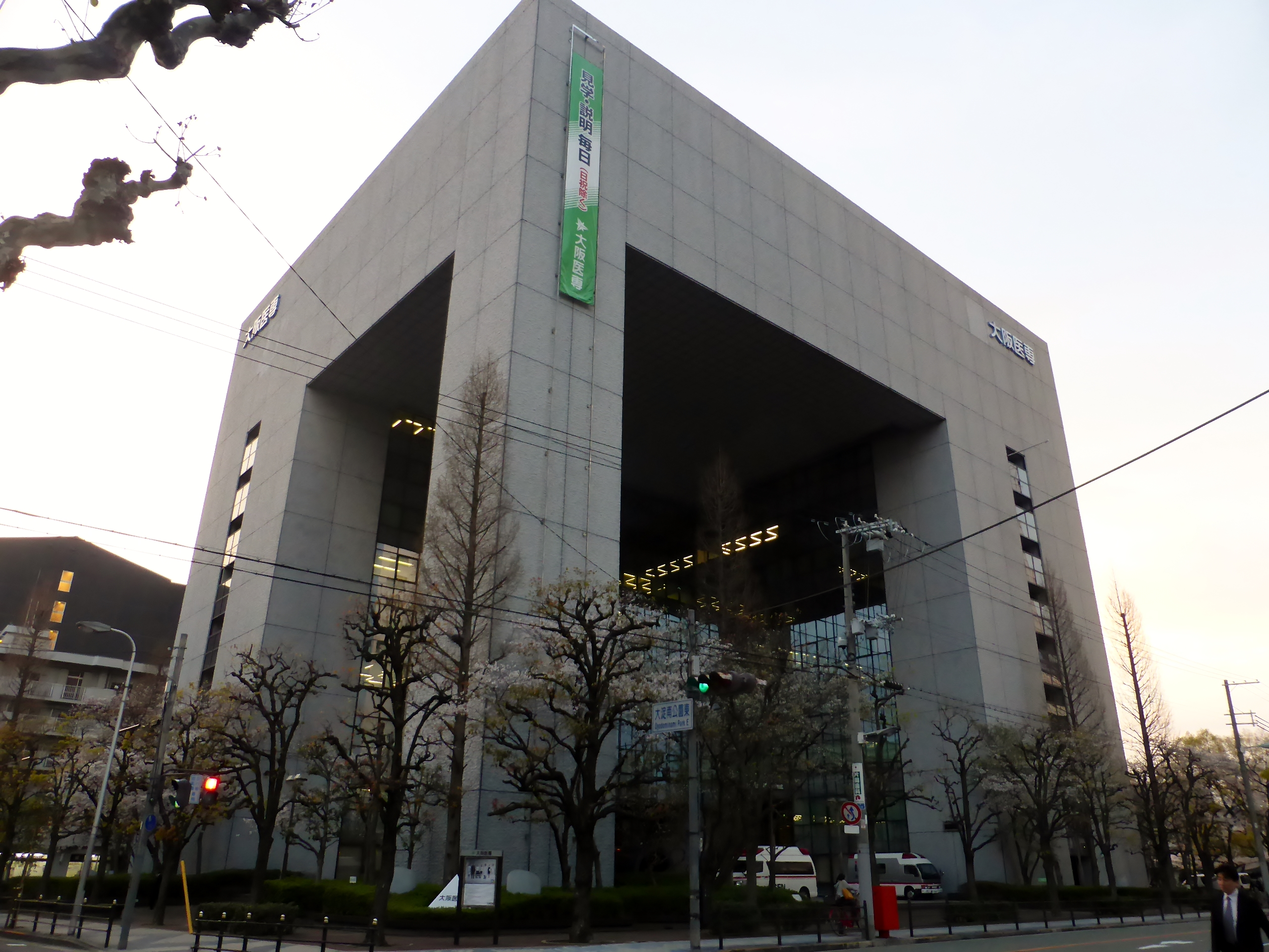 大阪医専を撮影。